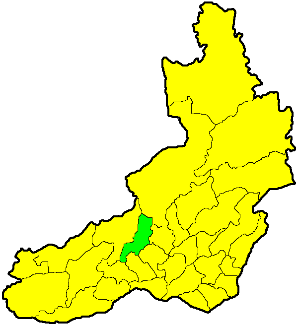 Карымский район на карте Забайкальского края